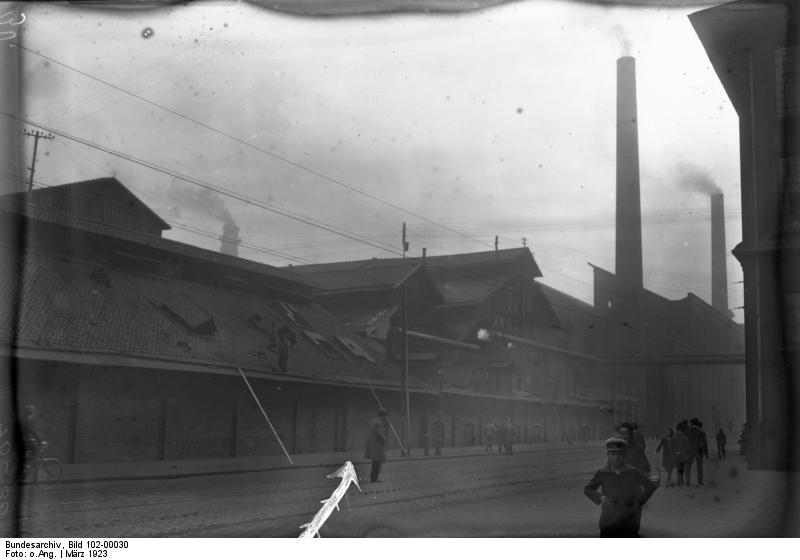 Zu den Ereignissen in Essen /Ruhrgebiet. Die Unglücksstelle vor den Krupp-Werken. Das Kreuz zeigt den Stand der Franzosen vor der Automobilhalle, der Pfeil die Schussrichtung, welcher 13 Krupp´sche Arbeiter zum Opfer fielen.